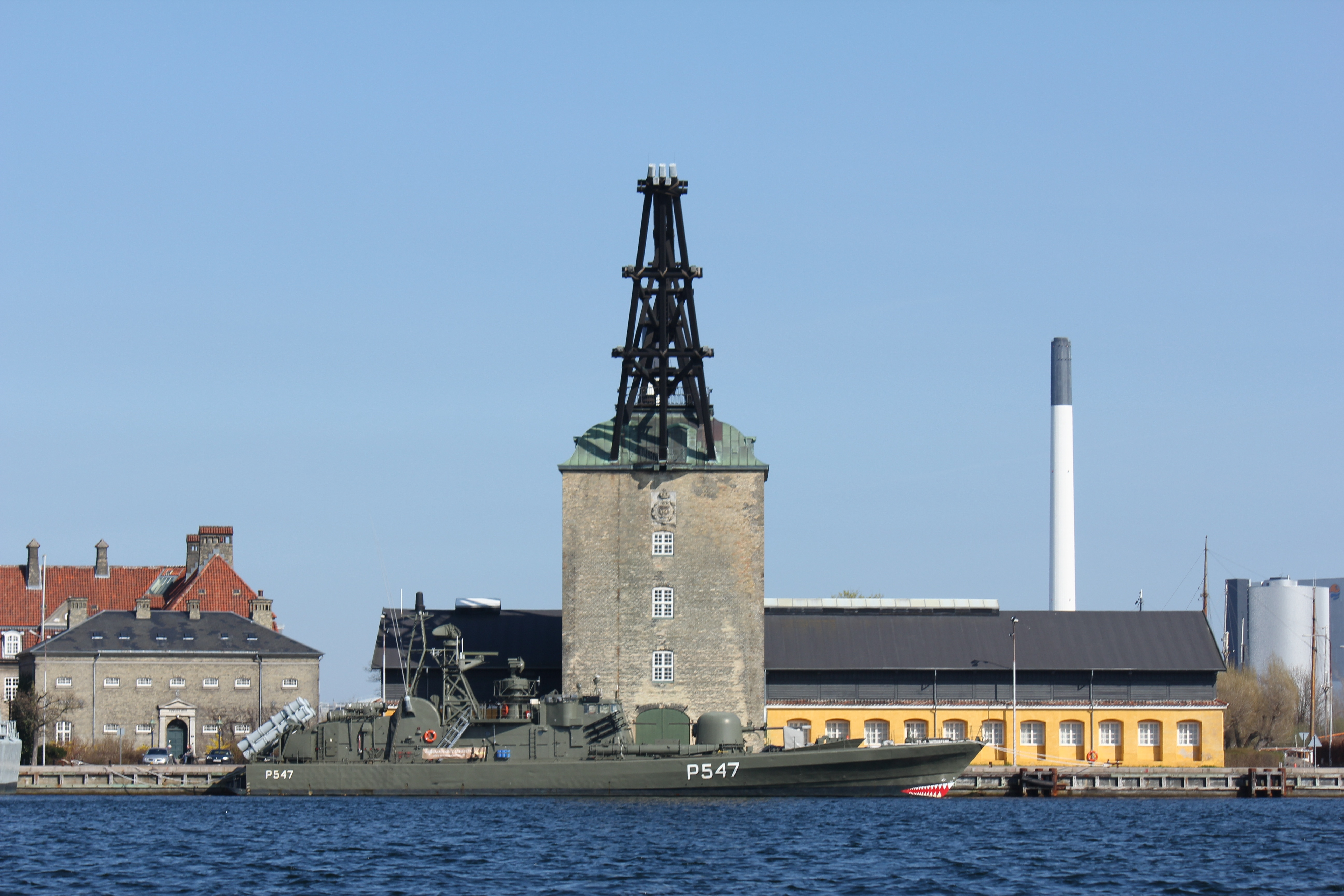 Torpedo-missilbåden Sehested under Mastekranen på Marinestation København